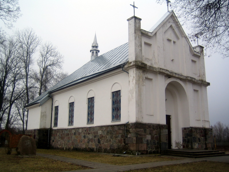 Беларуская (тарашкевіца): Крошын